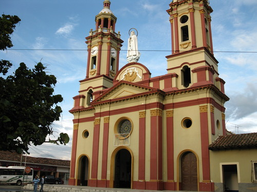 Iglesia Nuestra Señora del Rosario